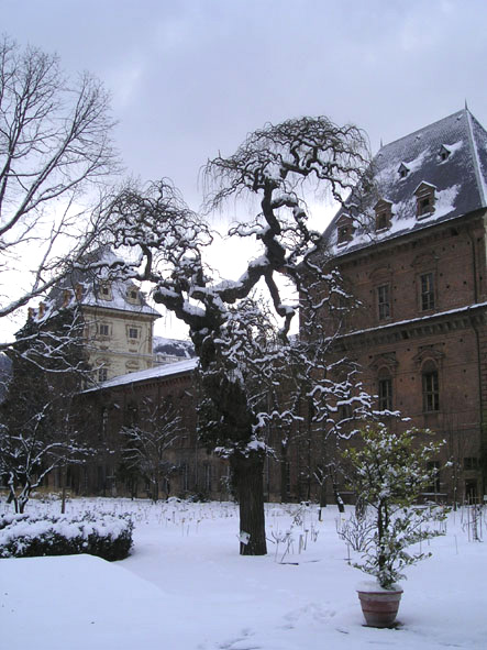 Orto Botanico di Torino, inverno 2004 Torino Botanical Garden in winter